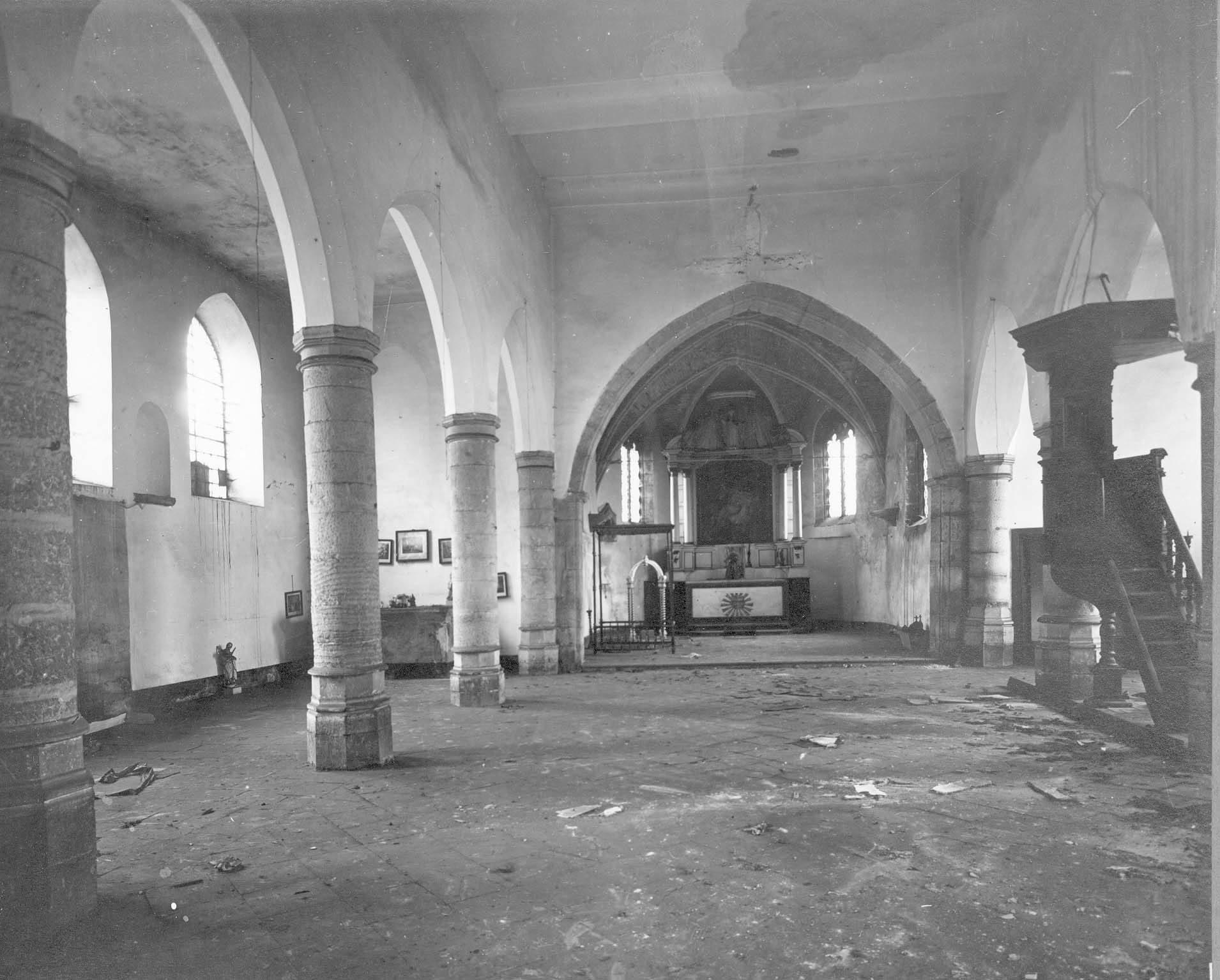 Dampremy (Charleroi - Belgique), Chapelle Saint-Ghislain - vue générale vers le chœur de l'ancienne église Saint-Remi en 1902. Photo d'Edmond Rahir (1864-1936).